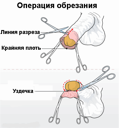 Схематическое изображение операции обрезания